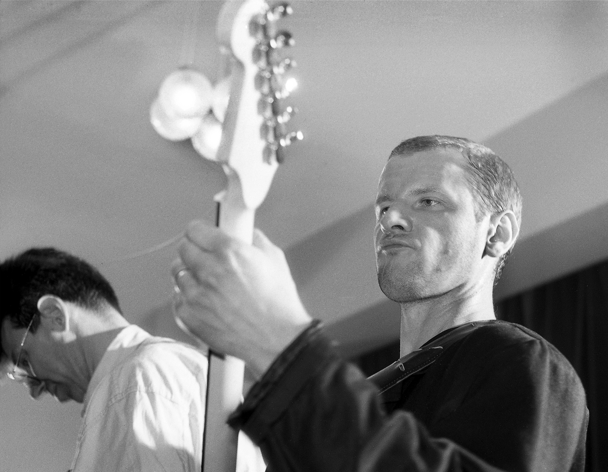 Margus Kappel, Rock Hotel 1987